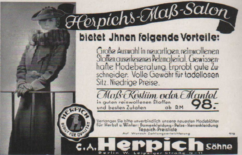 Herpichs-Maß-Salon, Anzeige der Firma C. A. Herpich, Berlin, ca. 1910.